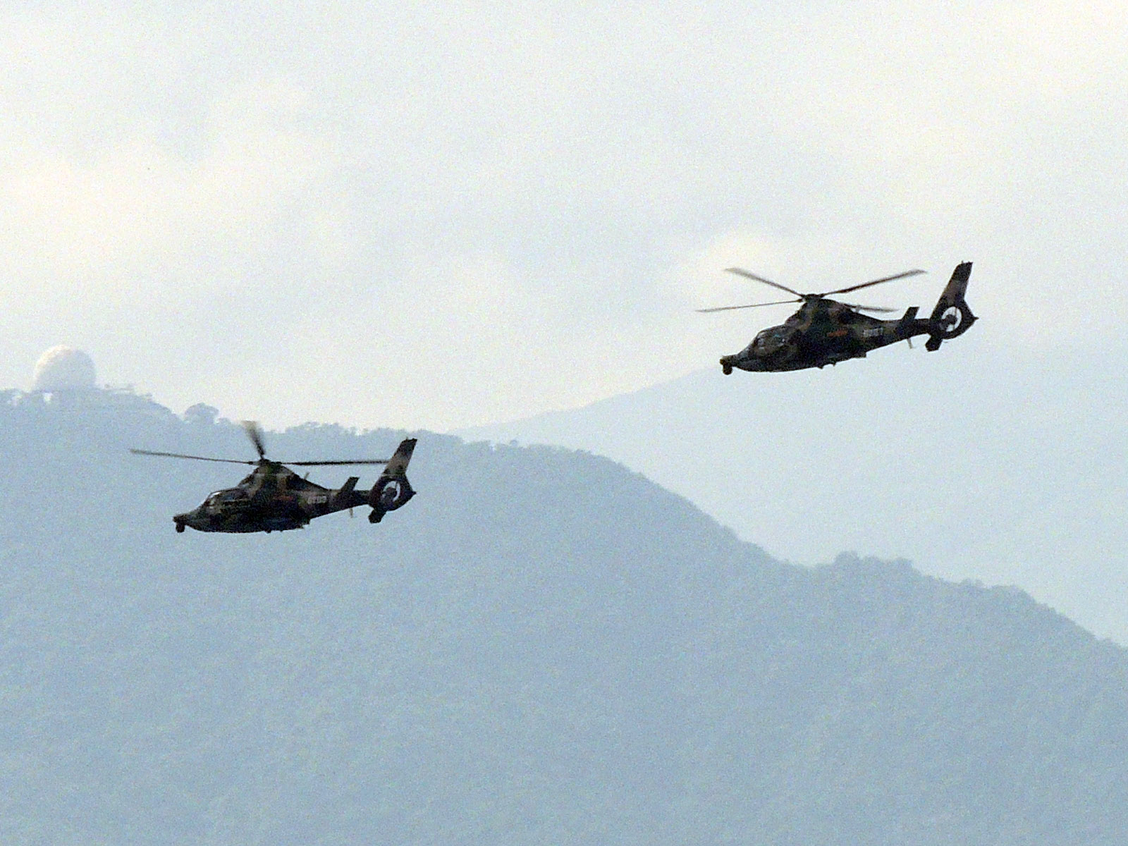 直-9W武裝直昇機